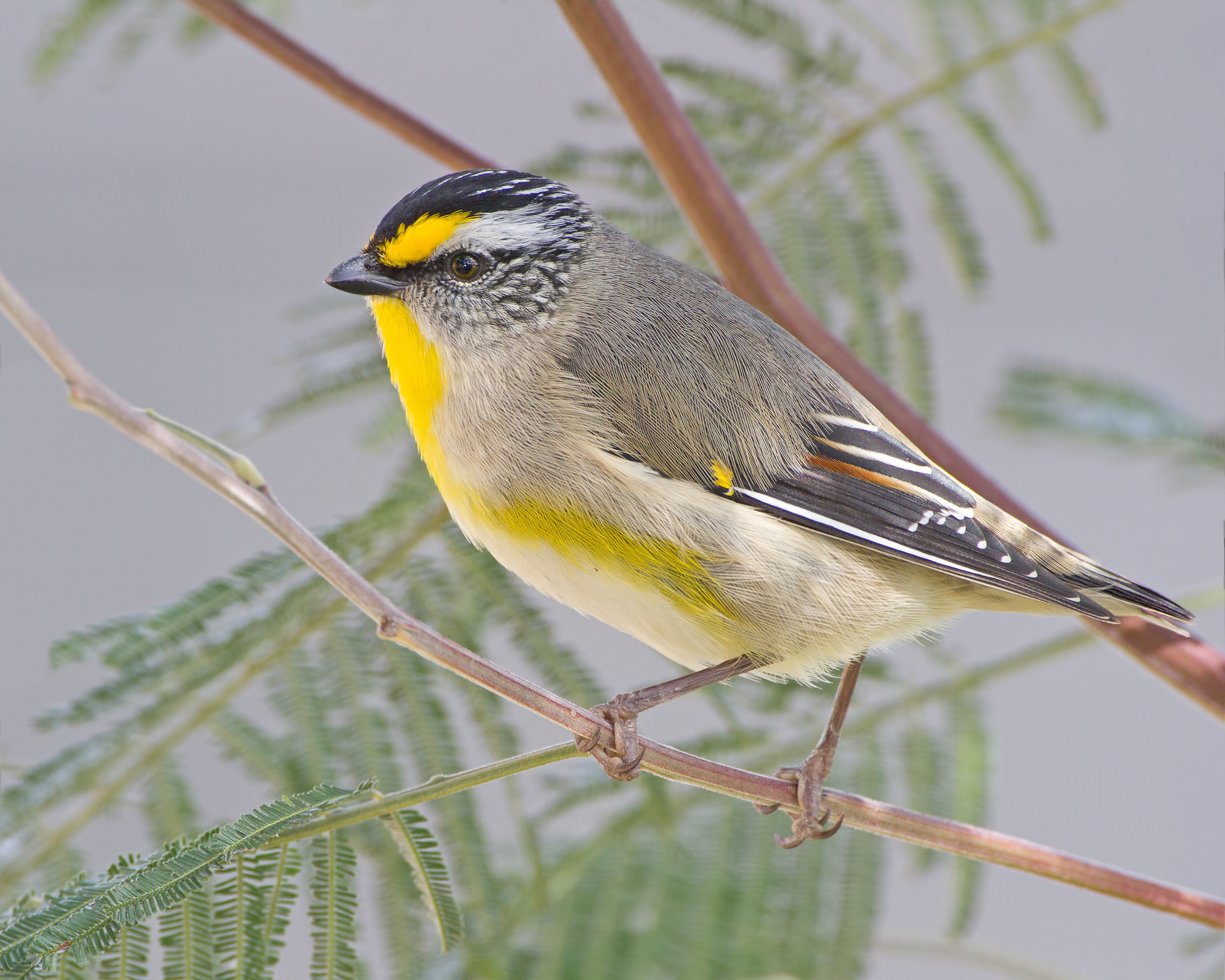 Striated Pardalote (Pardalotus striatus), Risdon Brook Park, Tasmania, Australia